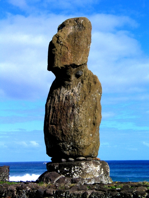 Ahu Tahai